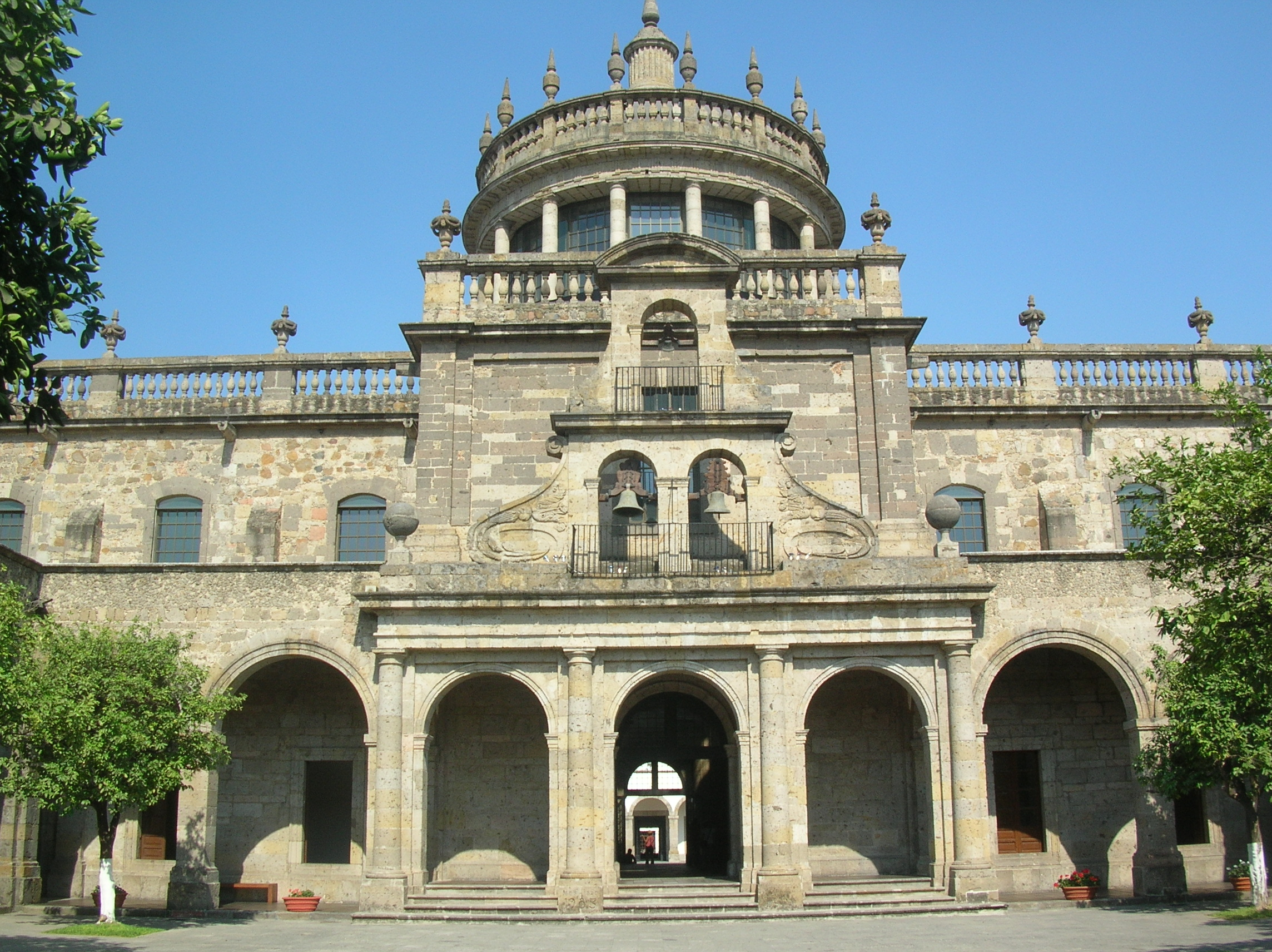 Hospicio Cabañas, Guadalajara, Jalisco, Mexico autor: patrick.denizet